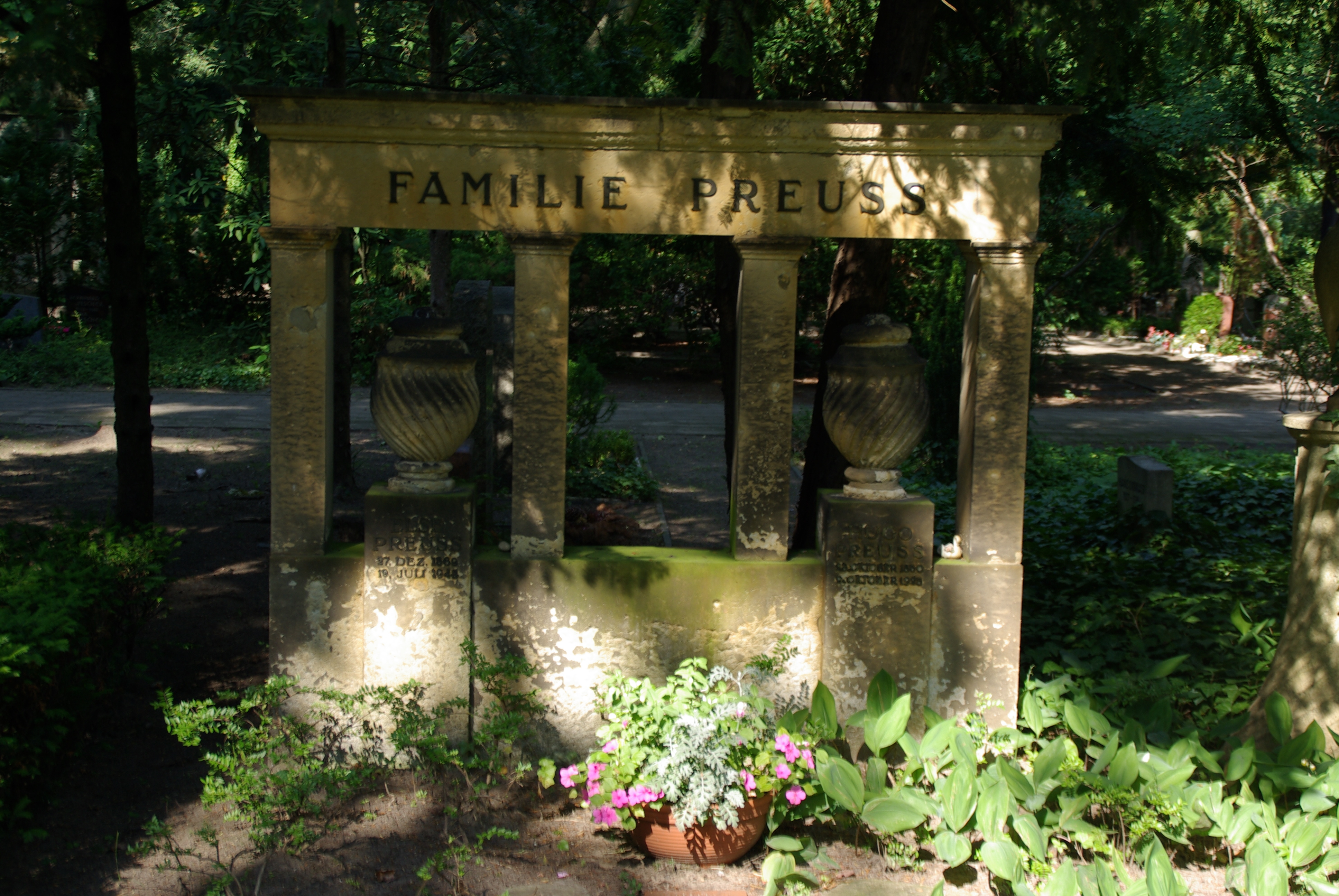 Berlin-Wedding. Der Urnenfriedhof in Berlin-Wedding steht unter Denkmalschutz. Das Ehrengrab der Familie Preuss.